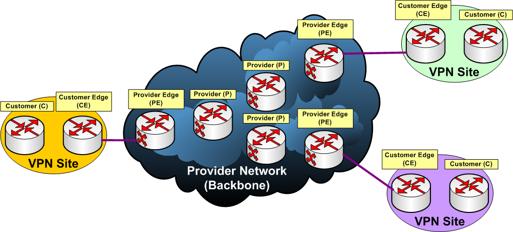 Монгол: VPN төхөөрөмжүүд